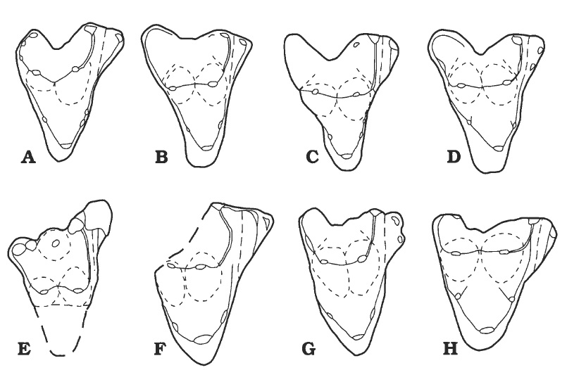 Diagrammatic comparison of Early Cretaceous tribosphenic upper molars and Late Cretaceous Deltatheridium in occlusal view, rendered to approximately the same width and reversed as needed. A. Pappotherium (penultimate M). B. Atokatheridium (Mx). C. Deltatheridium (M2). D. Murtoilestes (M2). E. Holoclemensia (?penultimate M). F. 'Oklahoma molar' (Mx). G. Prokennalestes (M2). H. Bobolestes (M2). Based on original specimens, casts, and photographs. Not to scale.